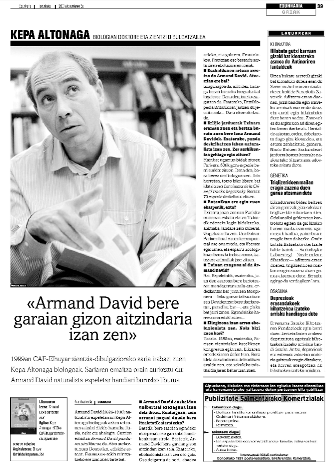 Kepa Altonagarekin elkarrizketa batean Armand Daviden liburuaz. Euskaldunon Egunkarian 2001ean.